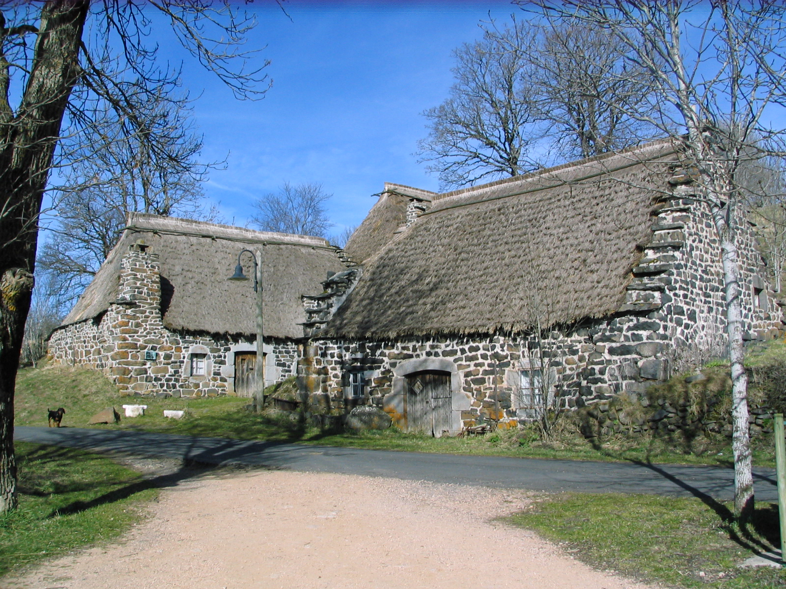 Photographie d'une chaumière de Bigorre. Seul village de France à conserver cette authenticitée